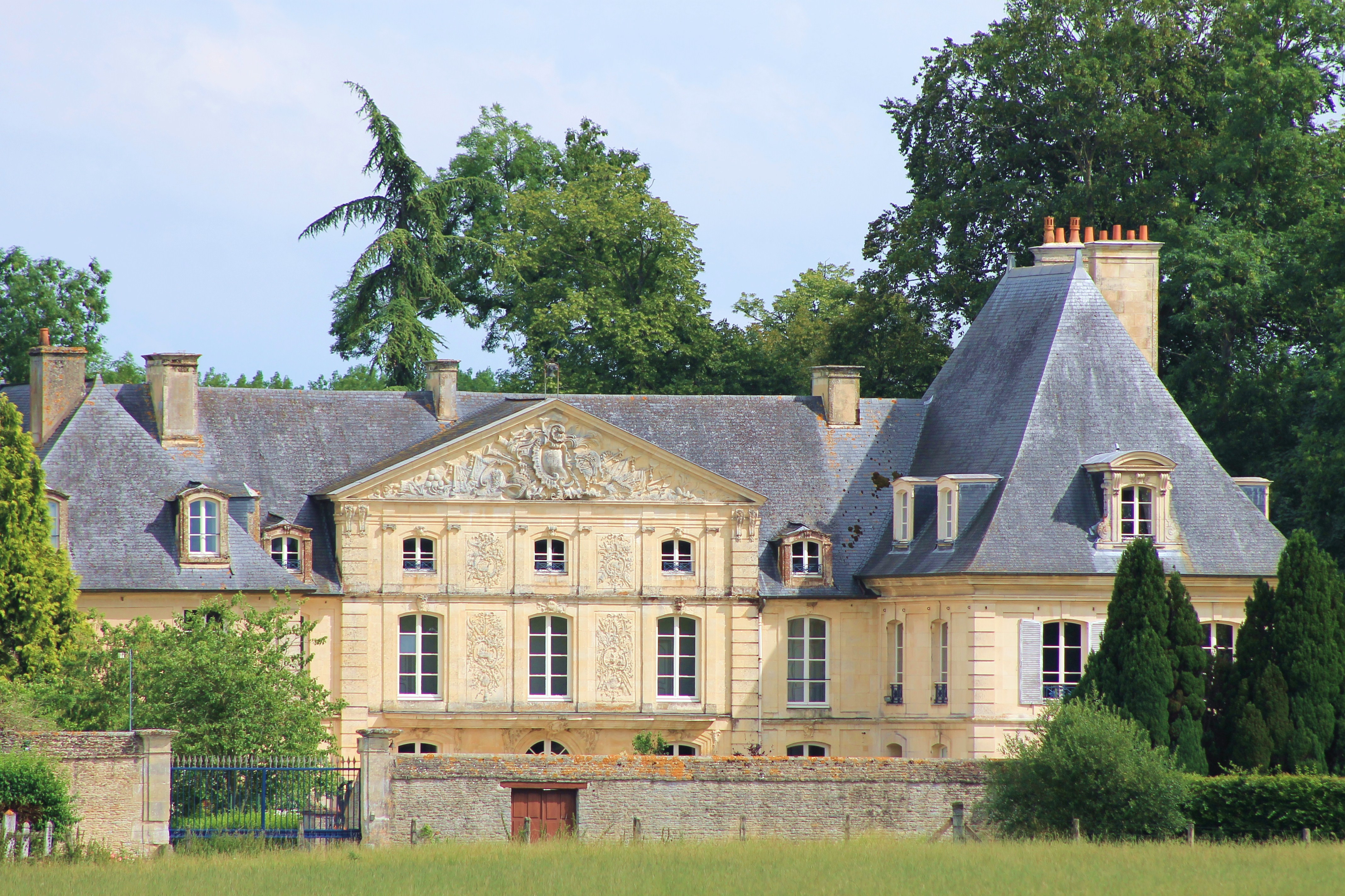 Château de Cesny-aux-Vignes (Calvados)